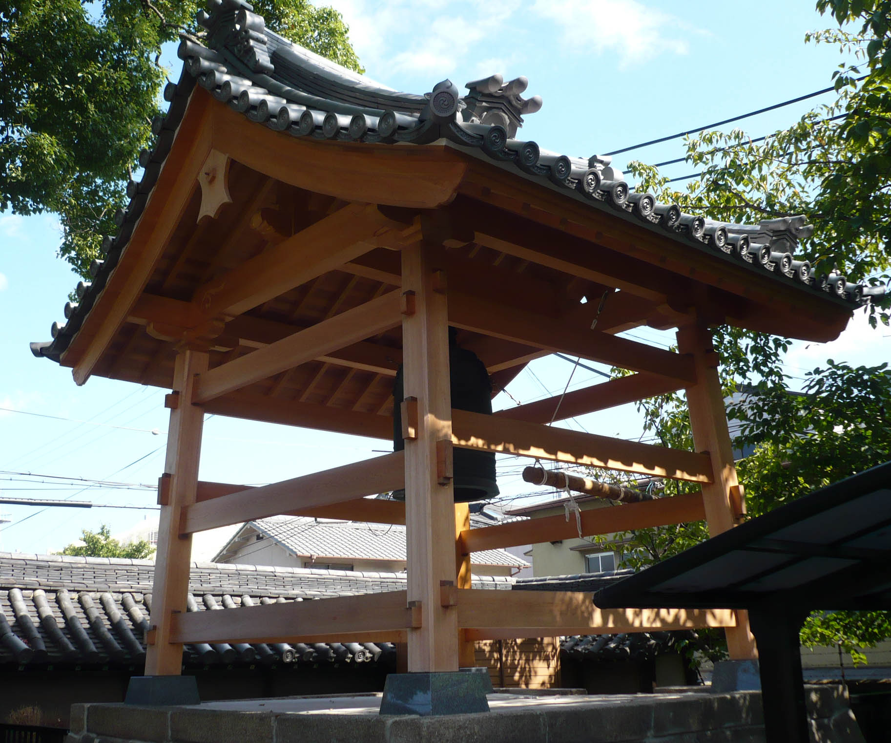 鐘楼